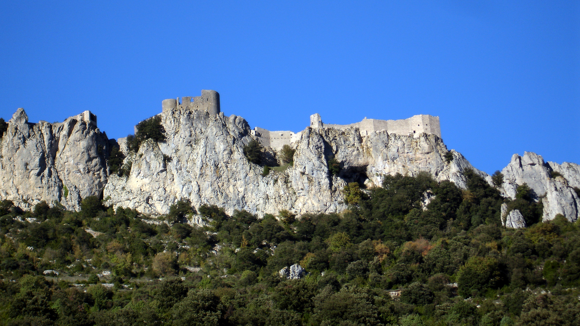 Château de Peyrepertuse